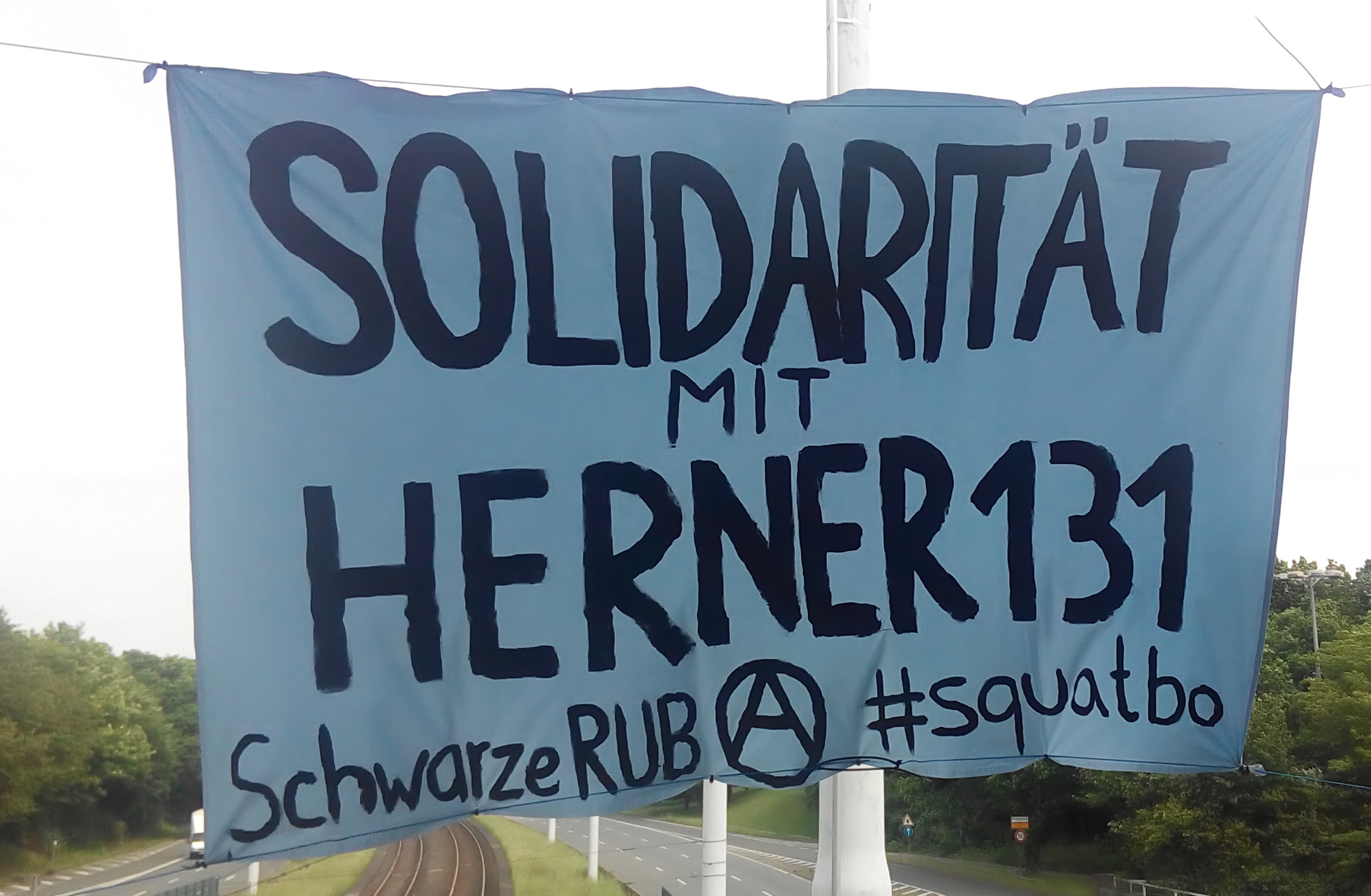 Die Hausbesetzer der Villa an der Herner Strasse 131 erfahren Solidarität der Studierenden in Bochum